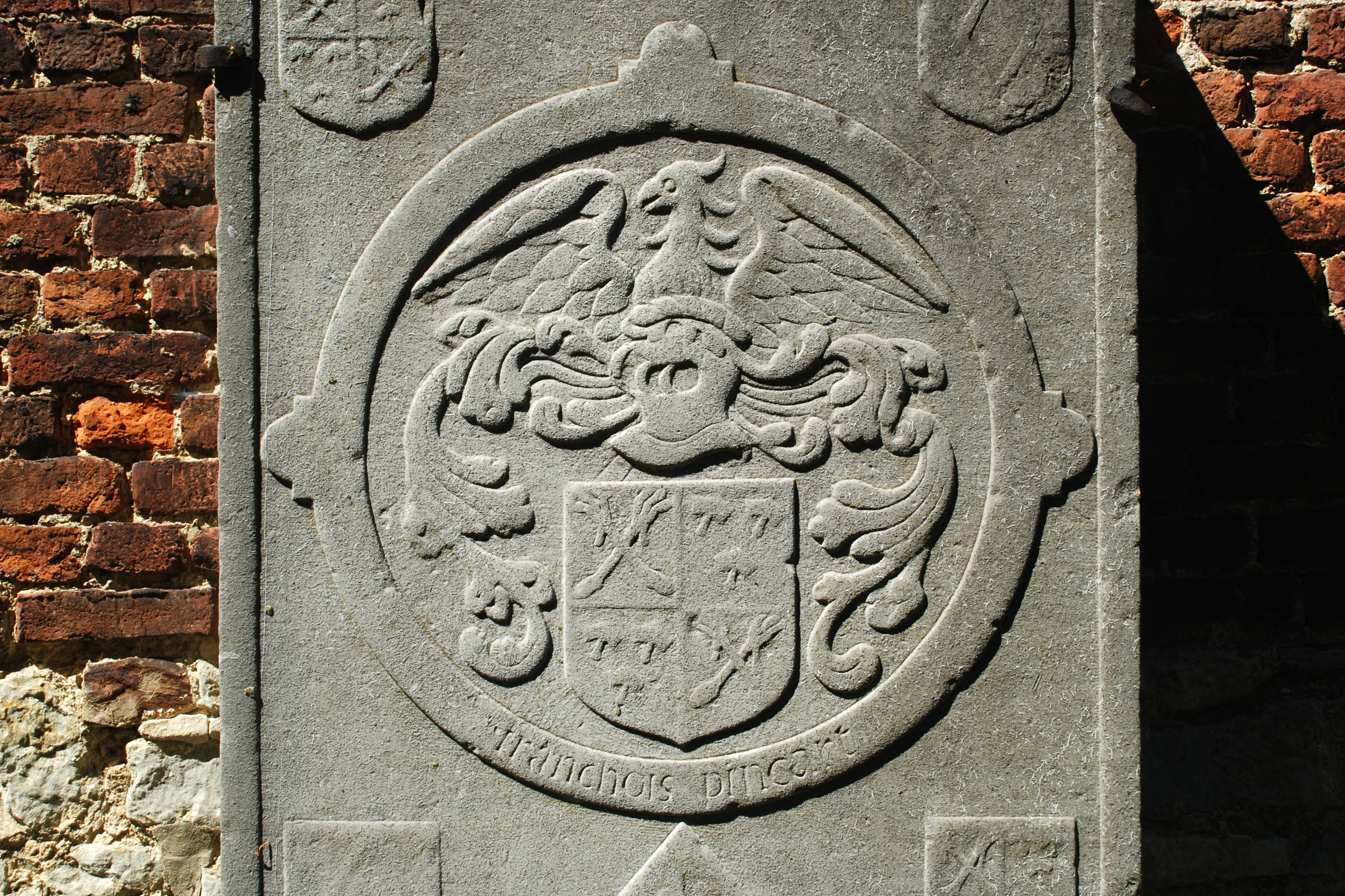 Belgique - Brabant wallon - Mont-Saint-Guibert - Église Saint-Pierre de Corbais - dalle funéraire de Franchois Pincart